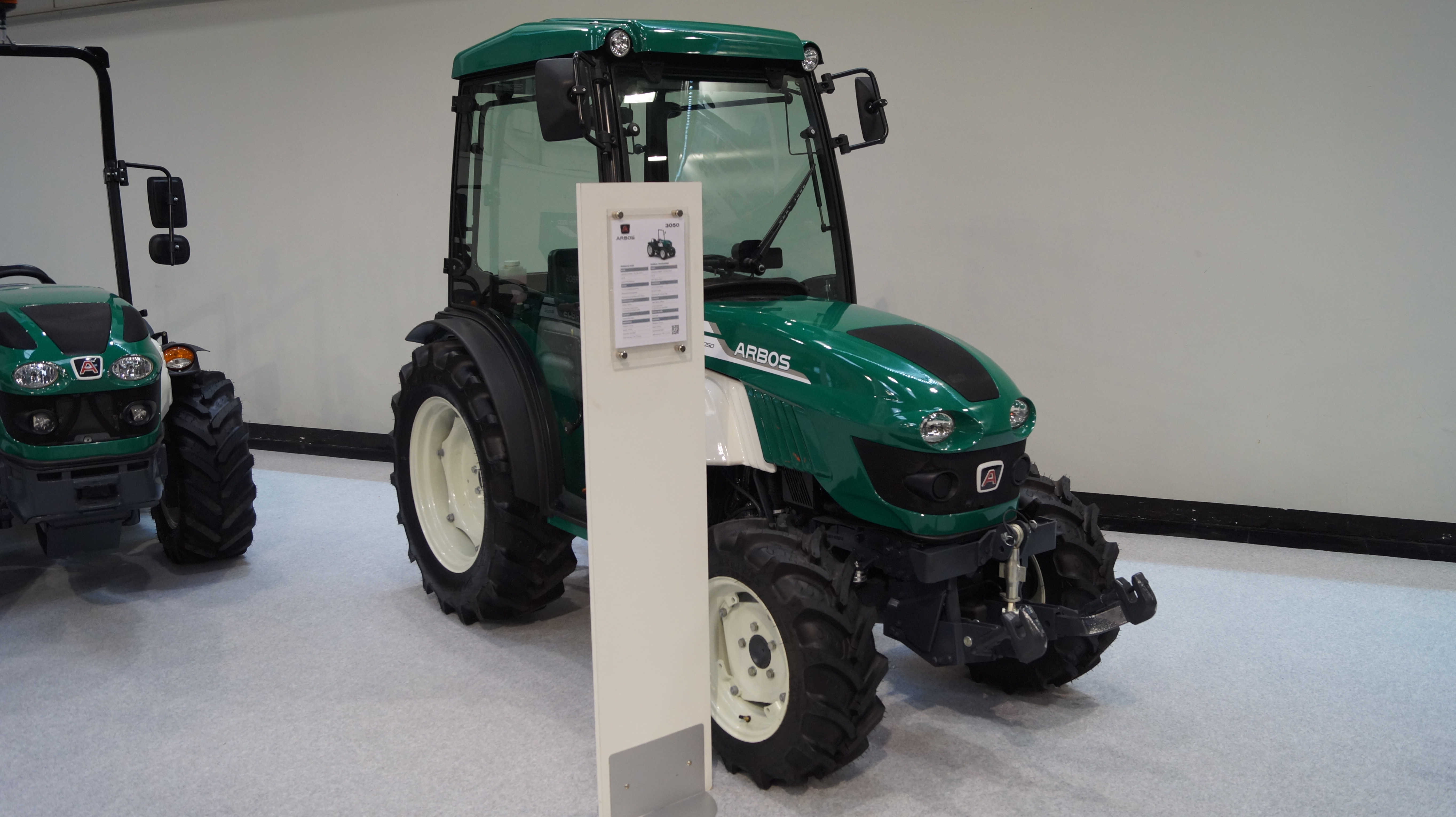 Schrägansicht der Front eines Arbos 3050, ausgestellt auf der Agritechnica 2017. Der Traktor ist baugleich mit dem Goldoni Ronin 40.